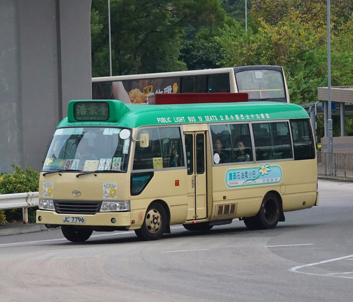 中文（香港）: 新界區專線小巴91A線，正途經葵福路近貨櫃碼頭路交匯處